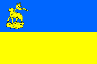 Vlag gemeente Velsen